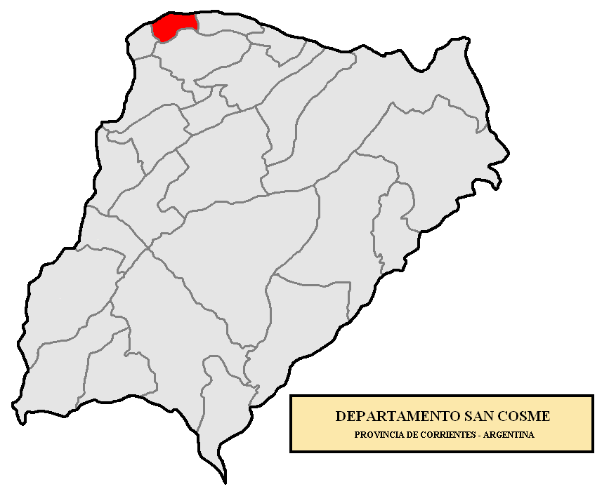 Localización del Departamento San Cosme en la provincia de Corrientes, Argentina Localización del Departamento San Cosme, en la provincia de Corrientes, Argentina.